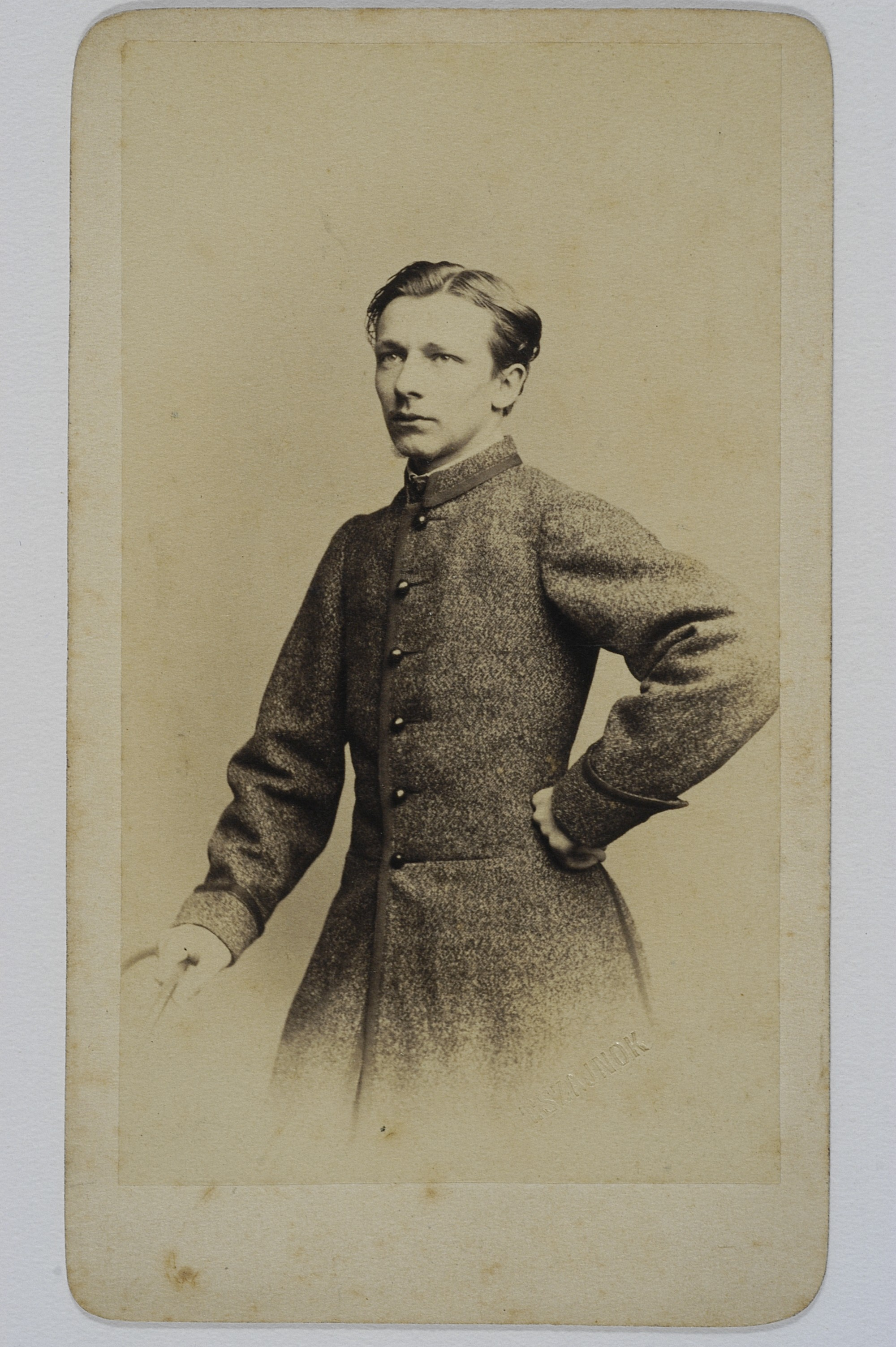 Roman Pilat, ok. 1865 r.